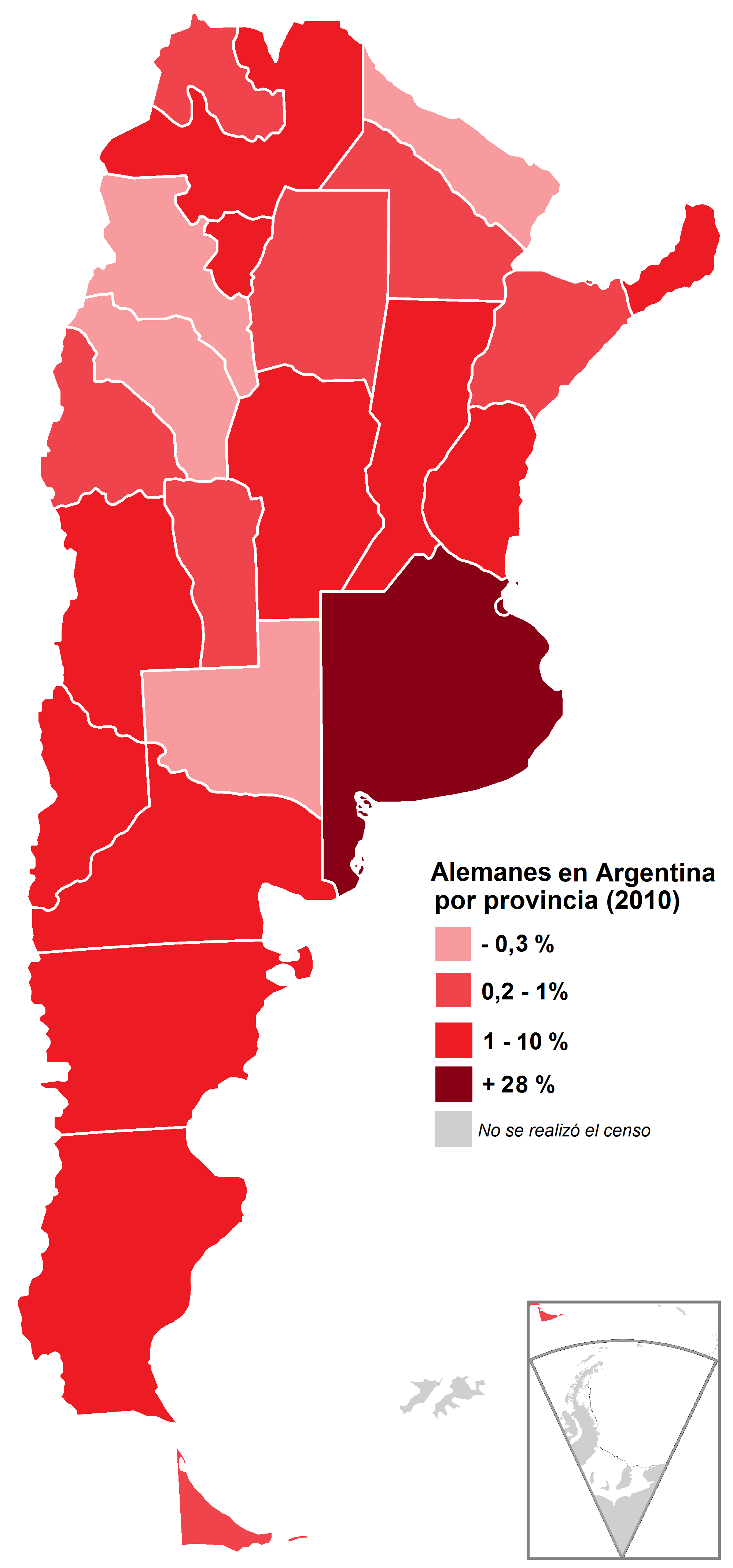 República Argentina por provincia. Población nacida en Alemania, en porcentaje. Año 2010. Fuente: Censo 2010 - INDEC.